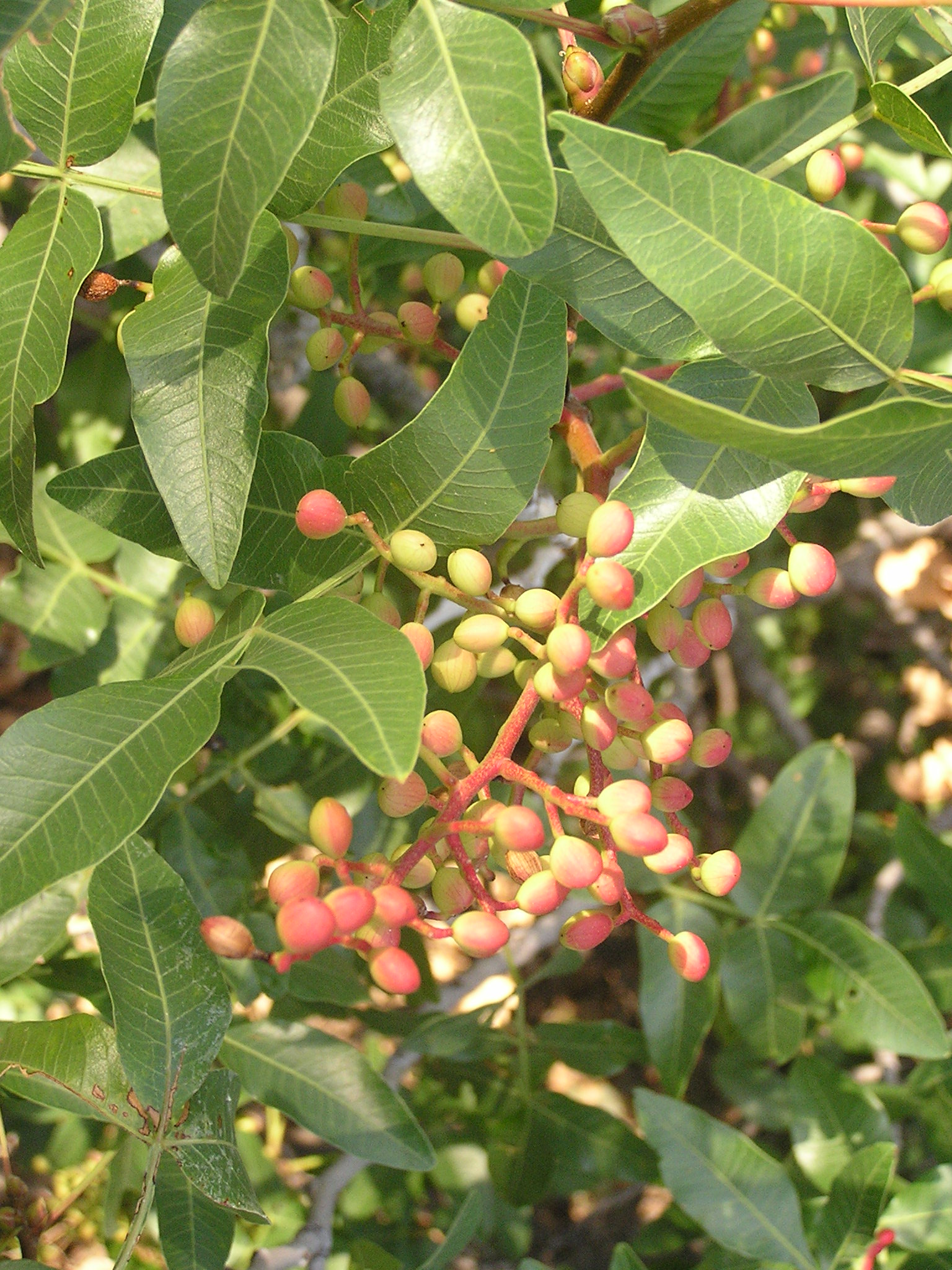 Растение